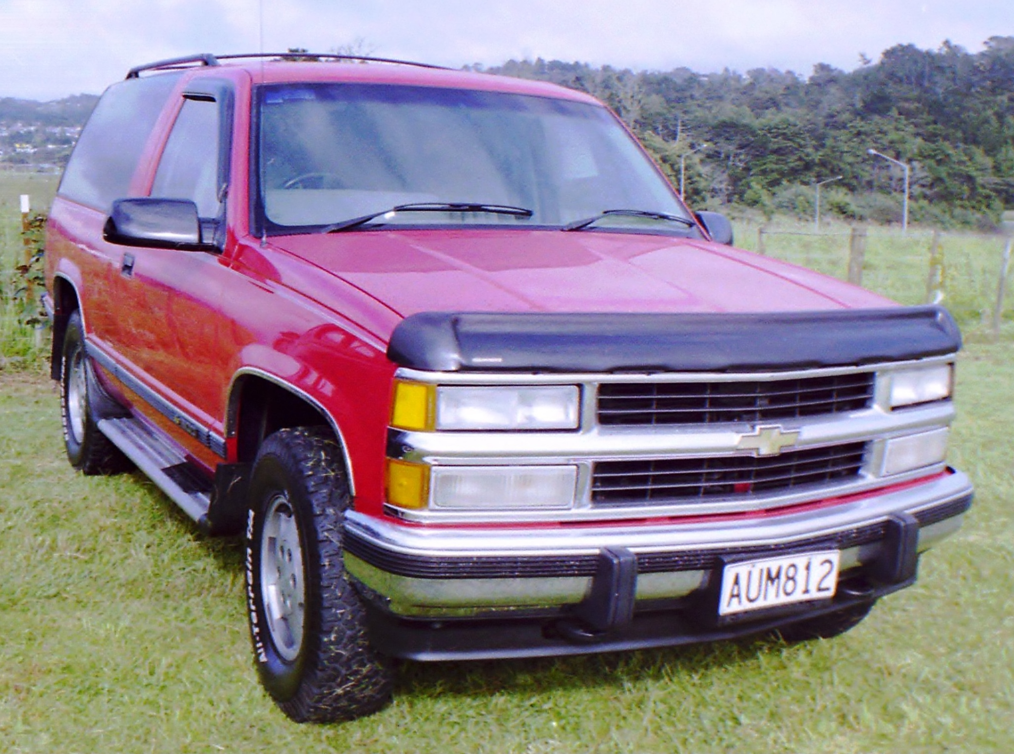 1993 Chevrolet Blazer